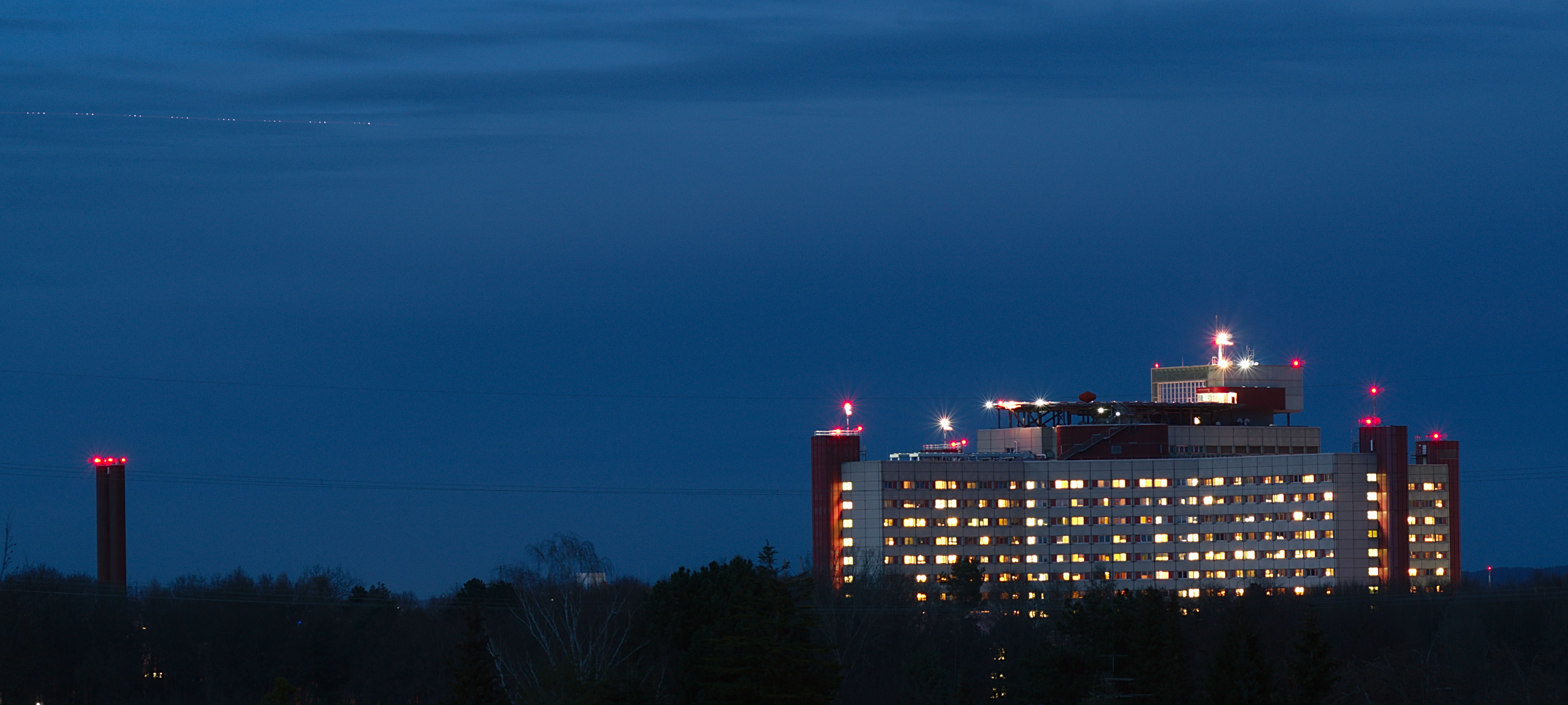 Universitätsklinikum Augsburg Nacht